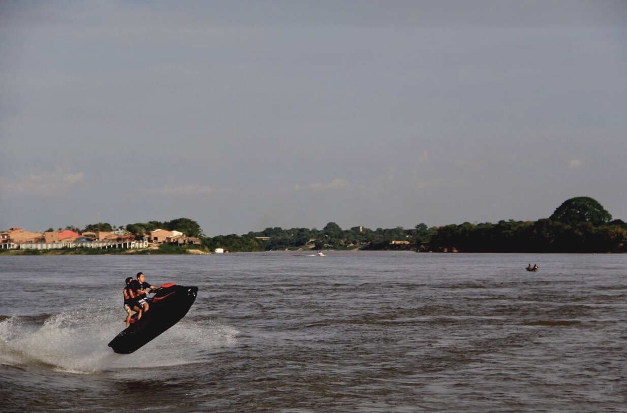 Jet ski em manobra de salto no rio Tocantins, em Marabá